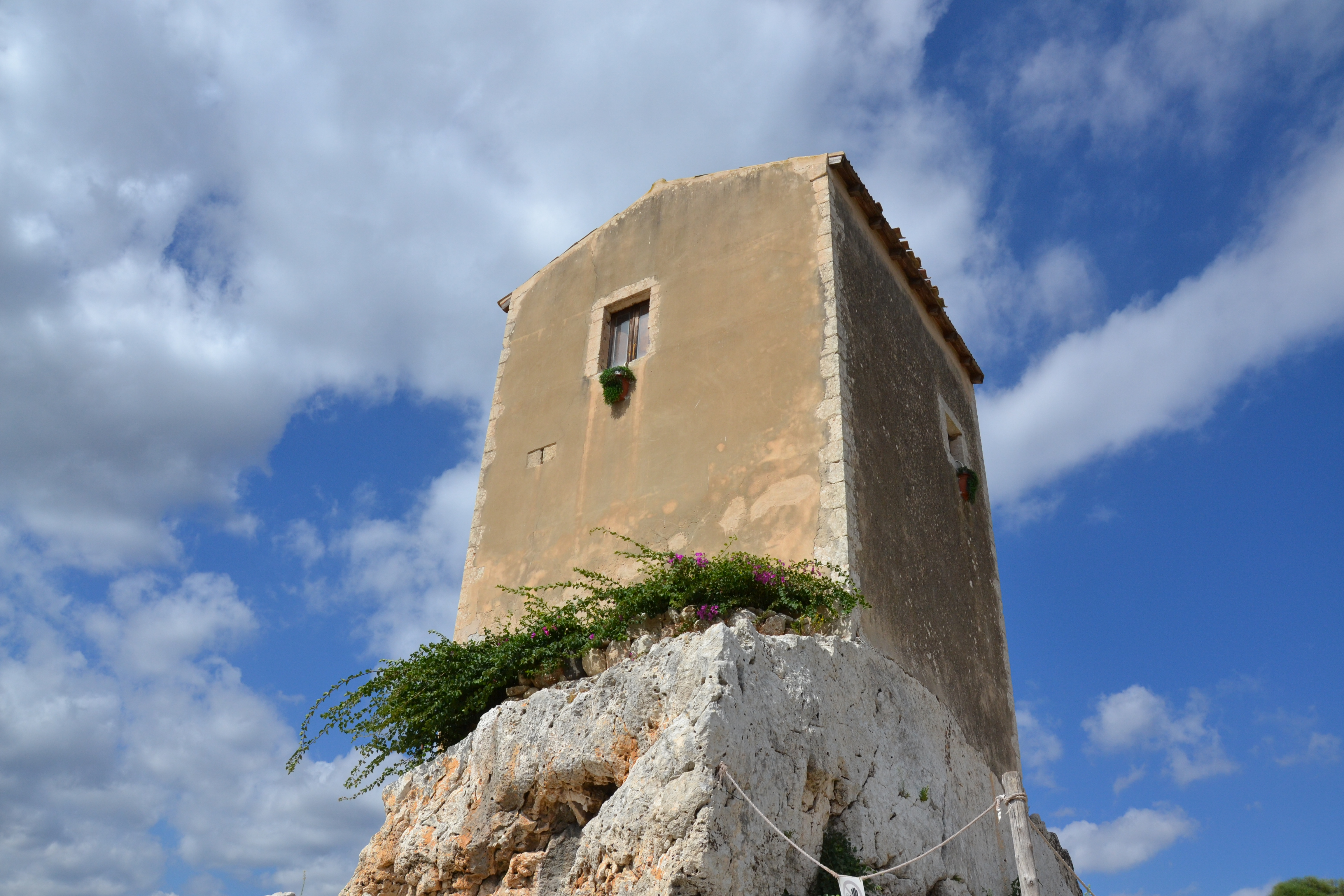 Mulino di Galerme (Teatro greco di Siracusa)